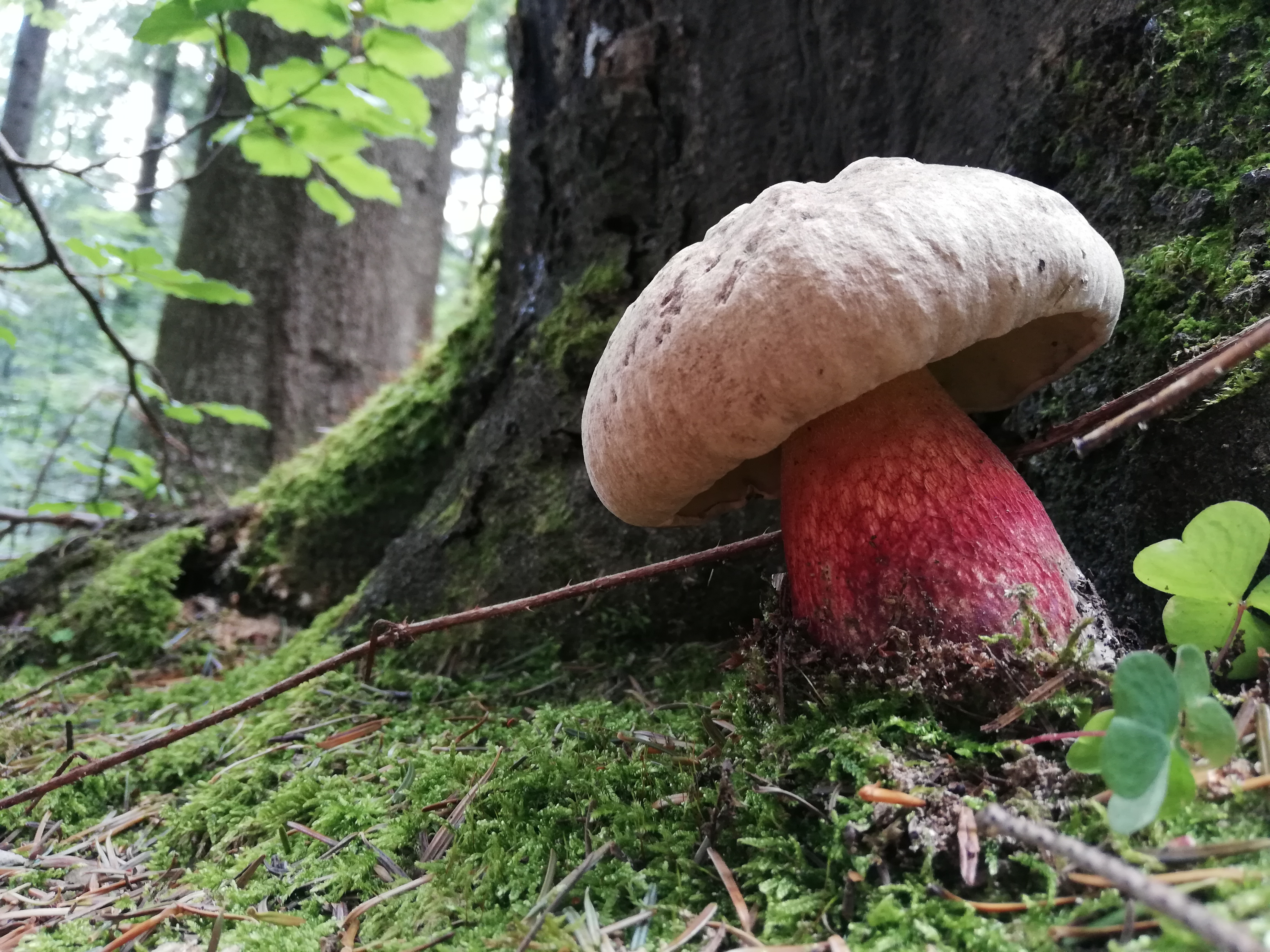 Owocnik z widoczną siateczką na trzonie